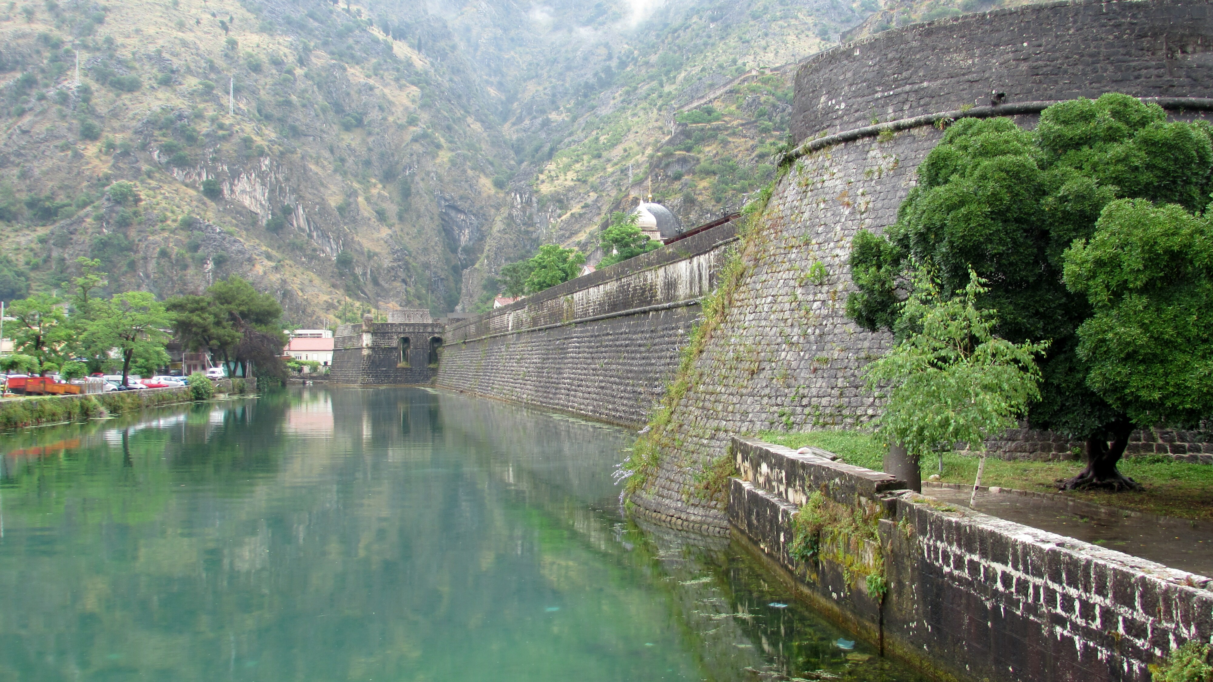 KotorAnsicht2014